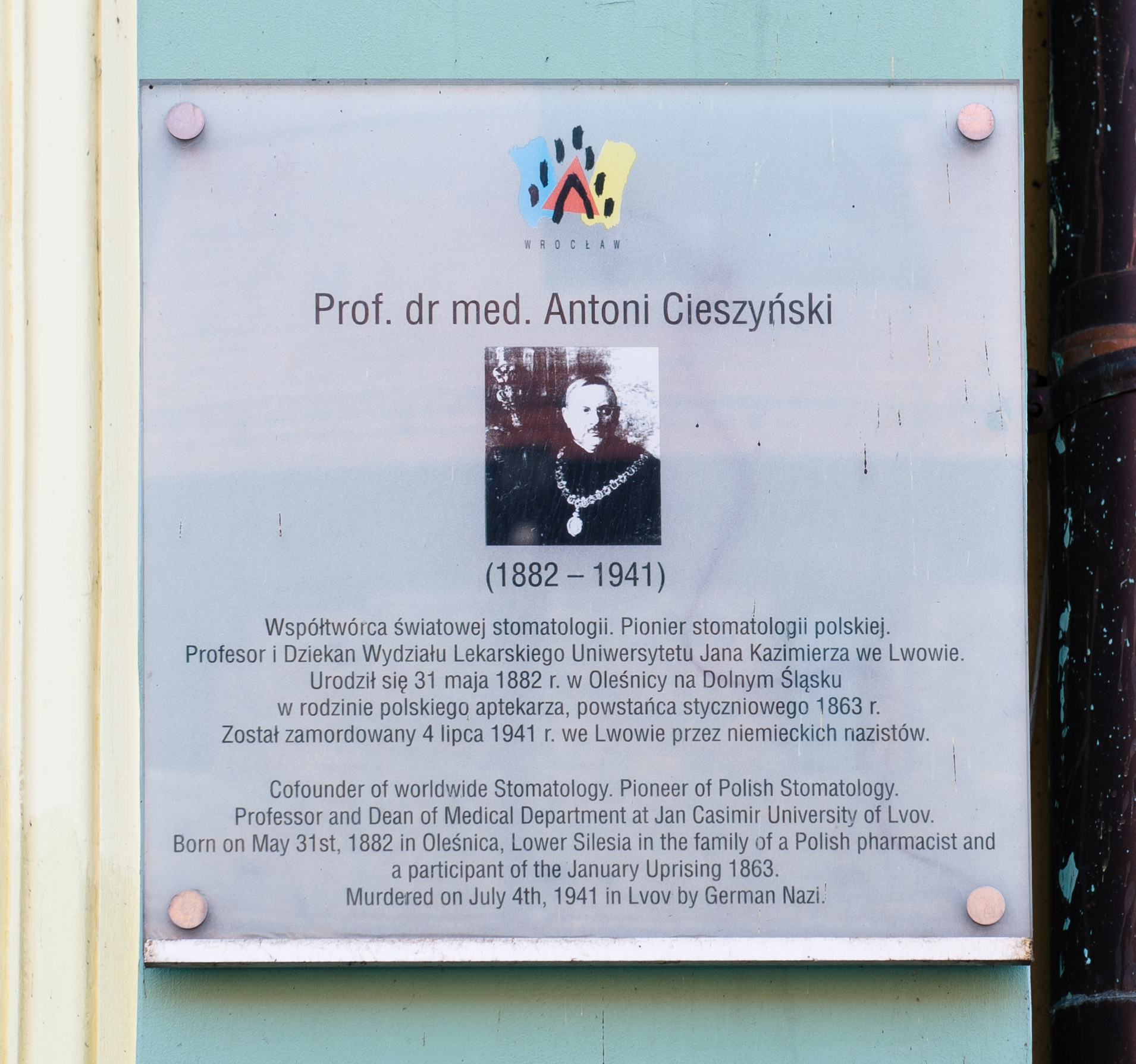 Tablica pamiątkowa poświęcona prof. Antoniemu Cieszyńskiemu przy wejściu do "CENTRUM DIKUL" we Wrocławiu, ul. Antoniego Cieszyńskiego 17-19.Tablicę odsłonił 18 X 2006 r. Sławomir Najnigier, wiceprezydent Wrocławia.